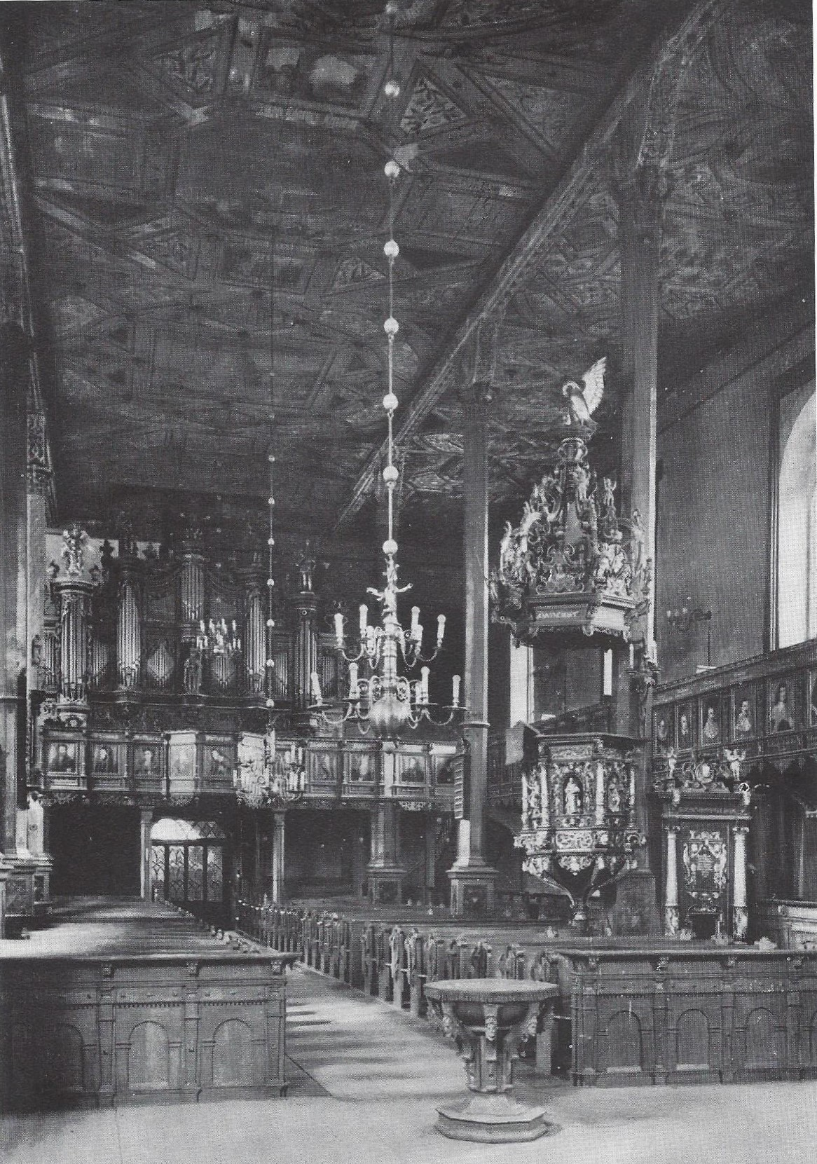 Innenraum der Lutherkirche in Insterburg